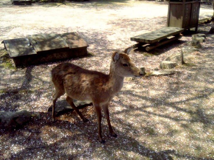 Cervinae(シカ),Hiroshima Miyazima